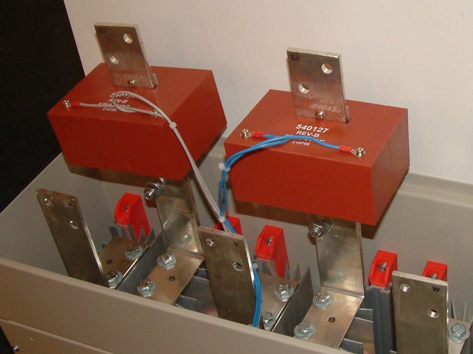 Europort 2009